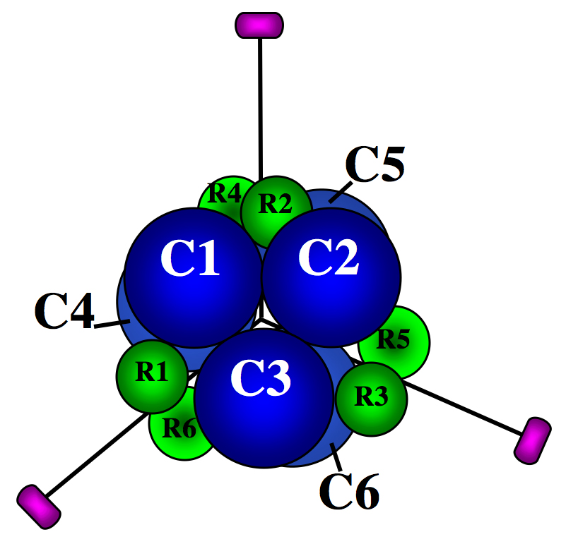 Aspartate carbamoyltransferase subunit structure